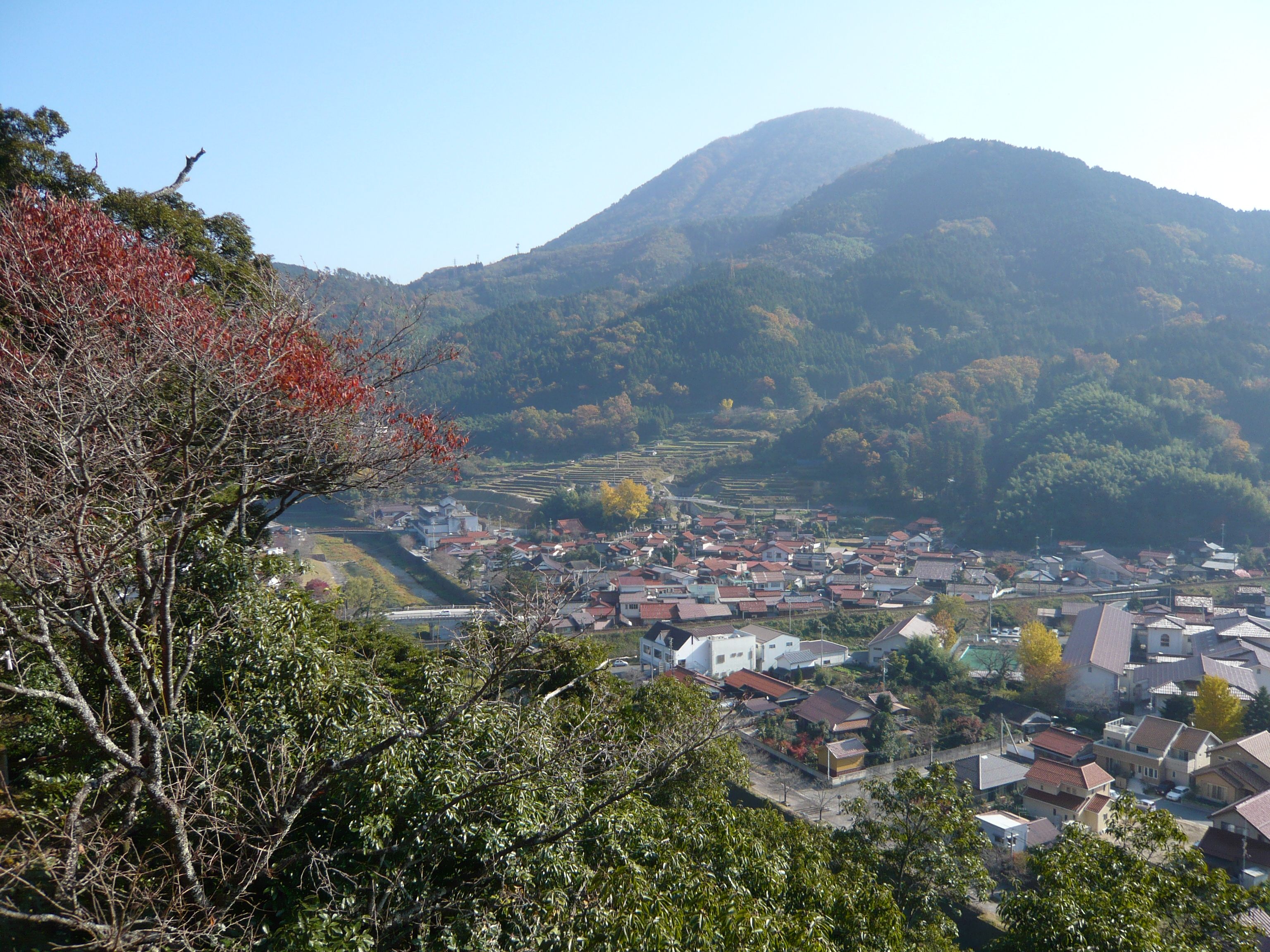 太鼓谷稲荷神社から見た津和野の町。後方は西から見た青野山溶岩ドーム（奥）と枯木山溶岩ドーム（右前）。